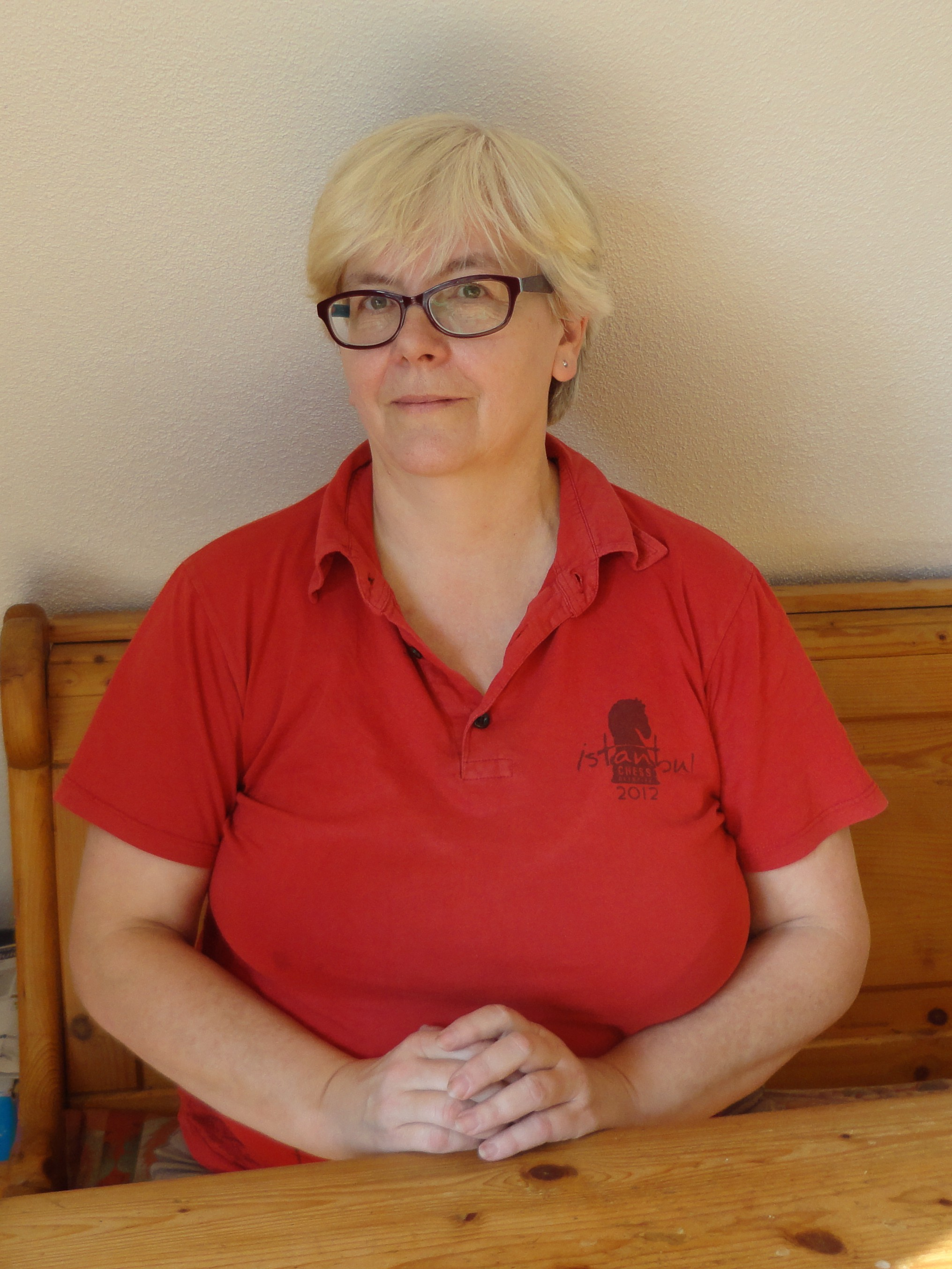 Barbara Hund, Freiburg im Breisgau, Oktober 2015.